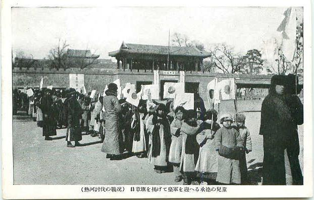 1933年，日军攻占热河省承德